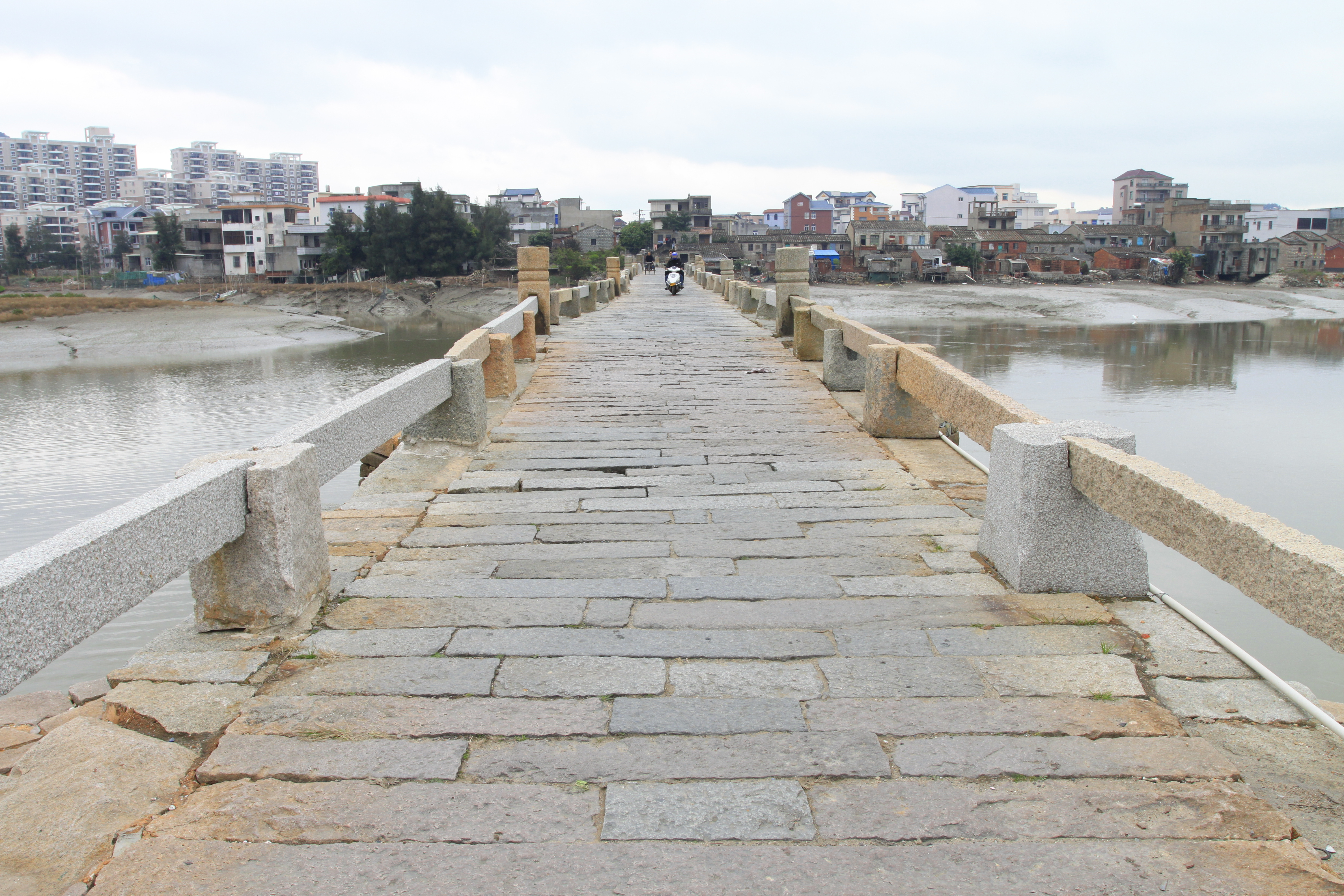 龙江桥，位于中国福建省福清市，是福建省文物保护单位。